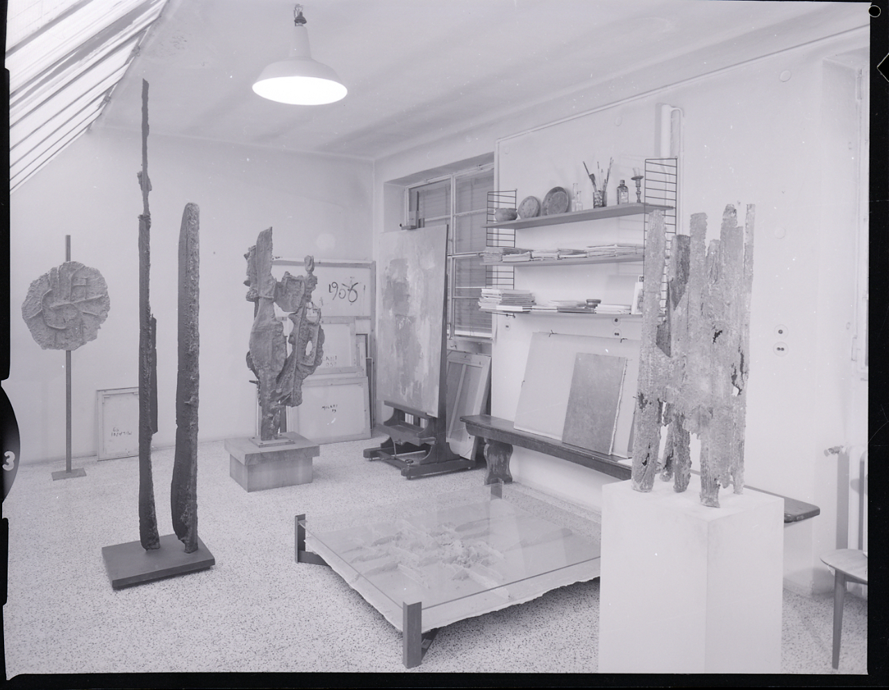 Servizio fotografico : Milano, 1961 / Paolo Monti. - Buste: 1, Fototipi: 2 : Negativo b/n, gelatina bromuro d'argento/ pellicola ; 10x12. - ((Serie costituita da 1 busta di negativi sciolti identificati con i nn.: 22391, 22392, e non identificabili singolarmente. - Sulla busta iscrizione didascalica e documentaria con data manoscritta a pennarello. . - Sul coperchio della scatola iscrizione didascalica manoscritta a pennarello: "Duplicati". - Fonte: Rubrica di Paolo Monti: Archivio fino 1-4-1961/ 31-3-1963 (1961-1963), presso Archivio Paolo Monti